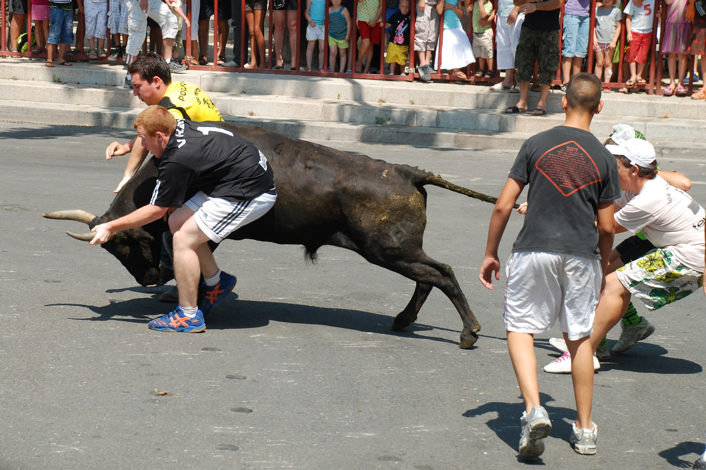 France - Gard - Calvisson - Abrivado-bandido - atrapaïre